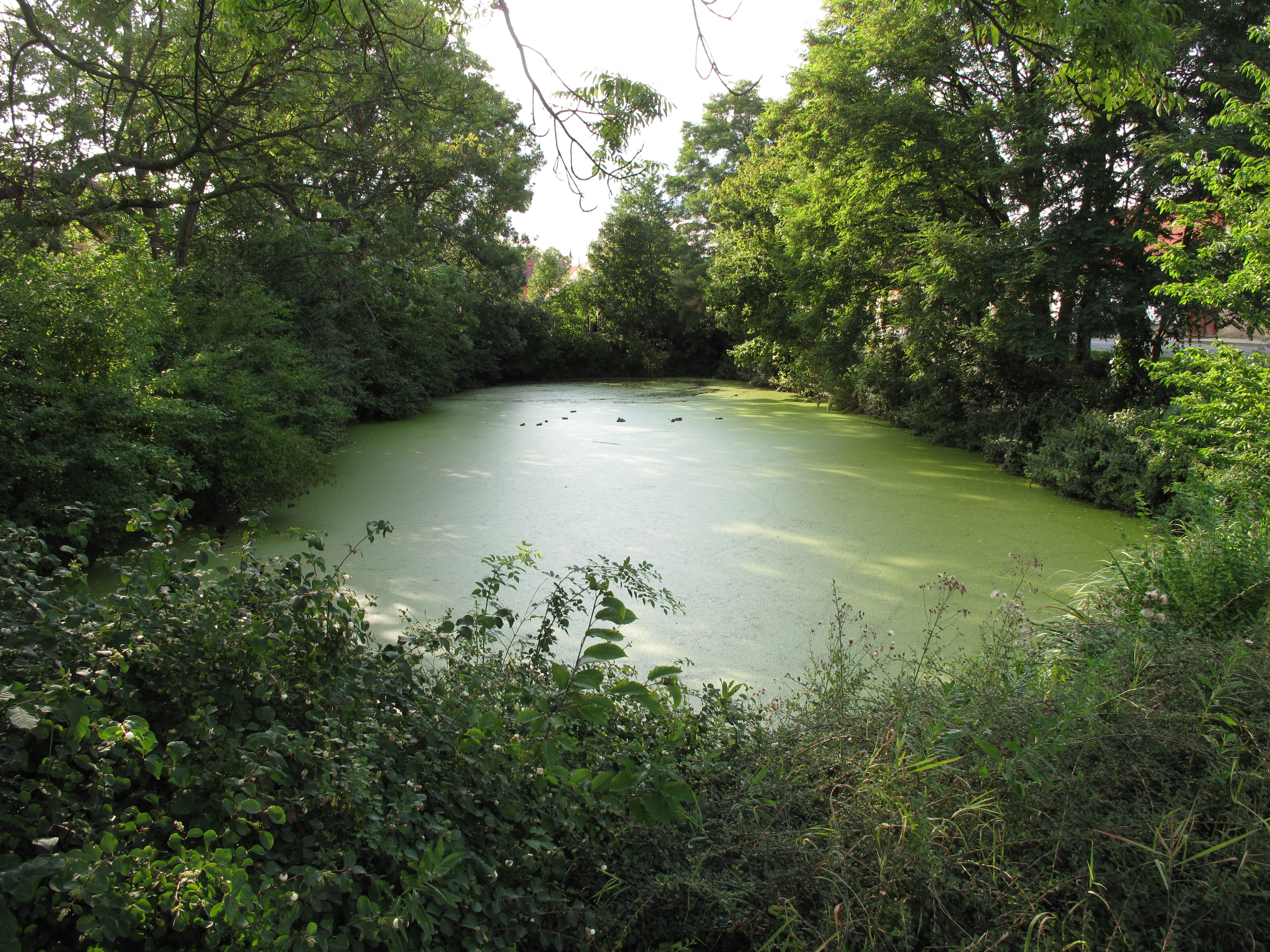 Horní rybník. Okres Praha-východ, Česká republika.